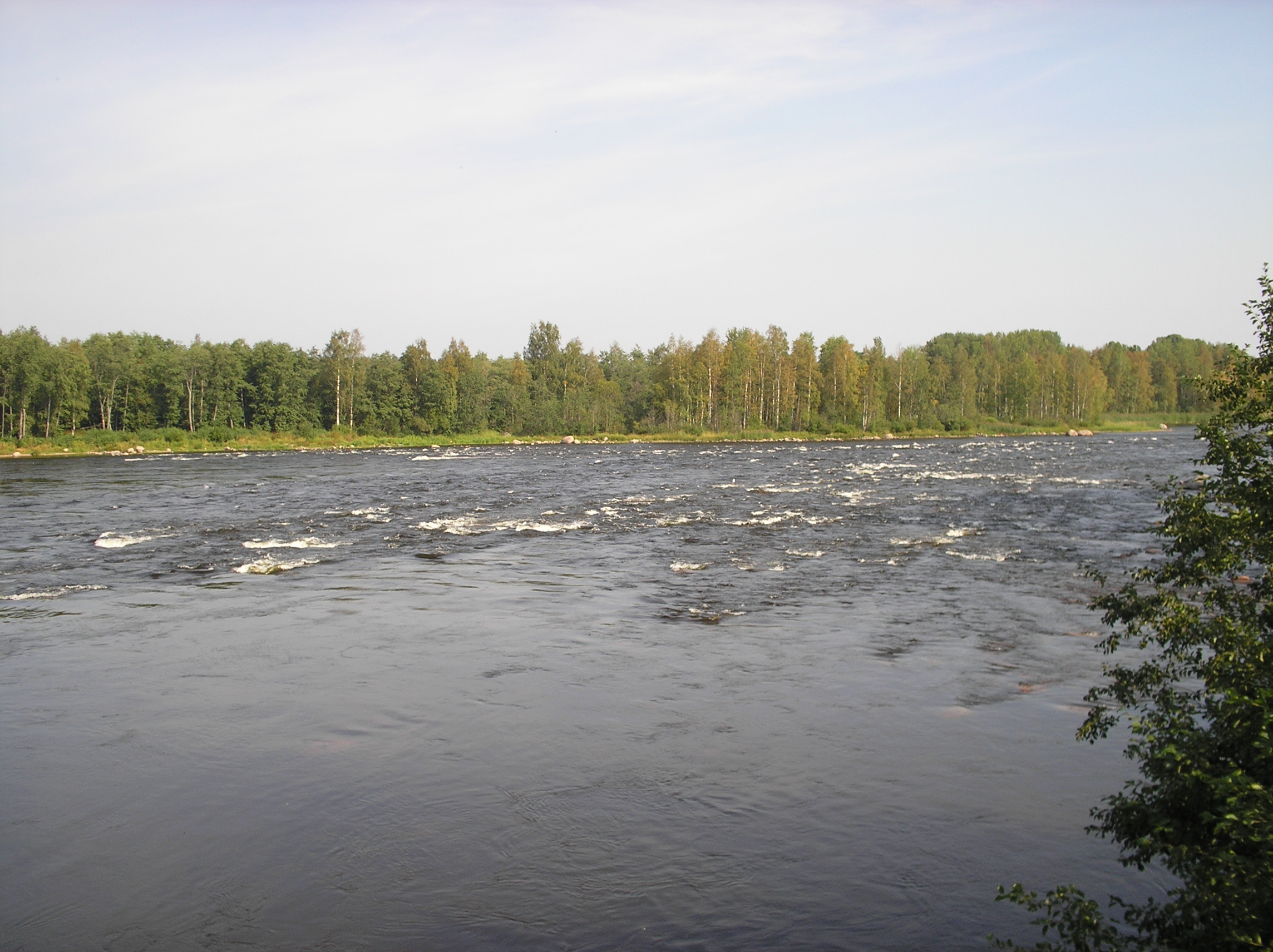 Порог Падунец на реке Бурной